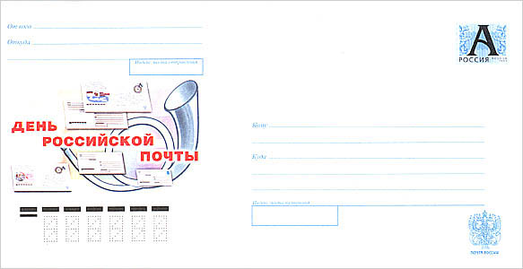 Художественный маркированный конверт «День российской почты», Российская Федерация, 2001.